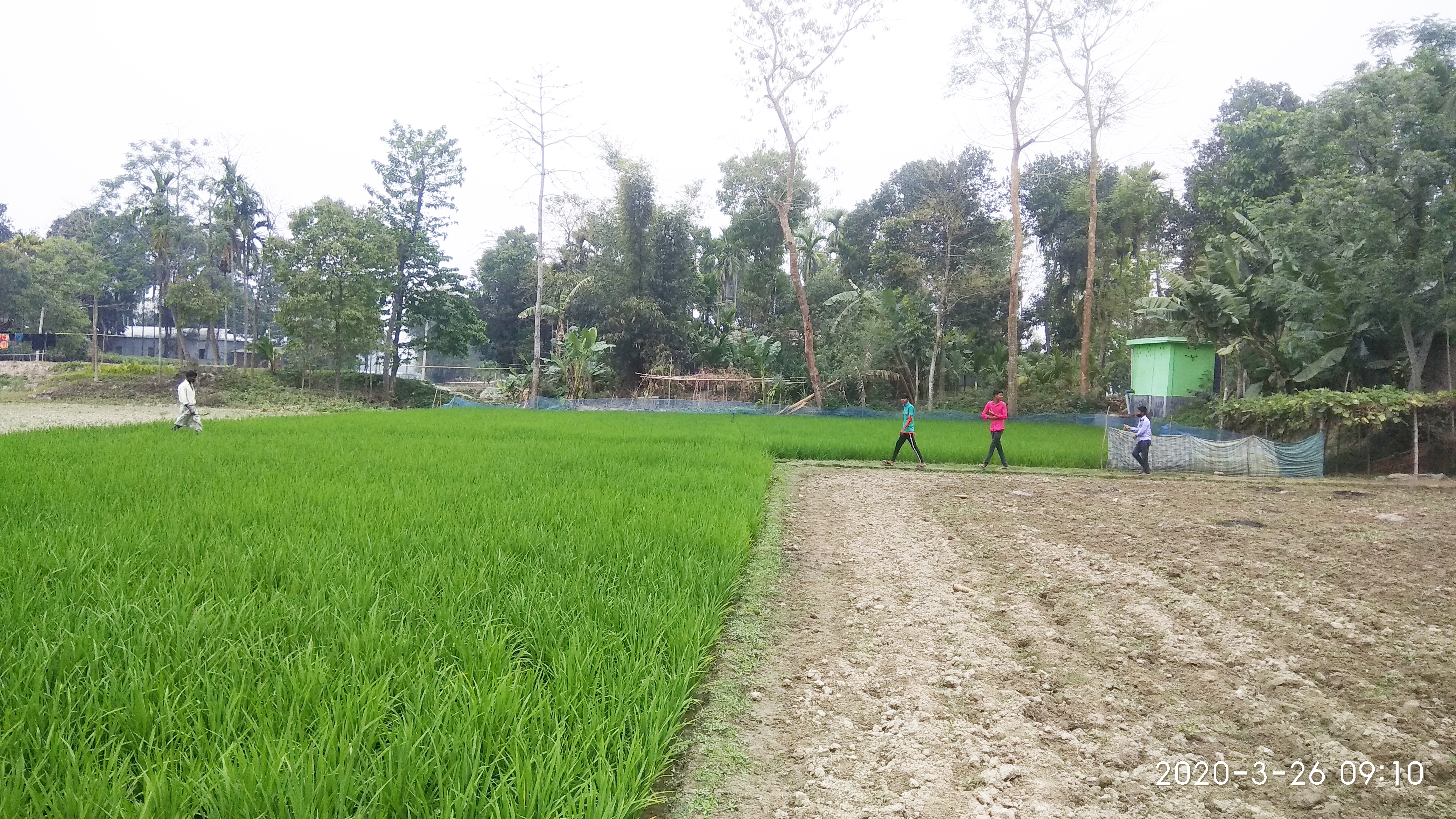 অসমীয়া: এই চিত্ৰ খনত বৰকলীয়া গাঁৱৰ কেতি-বাতিসমূহৰ বিৱৰণ দিয়া হৈছে।